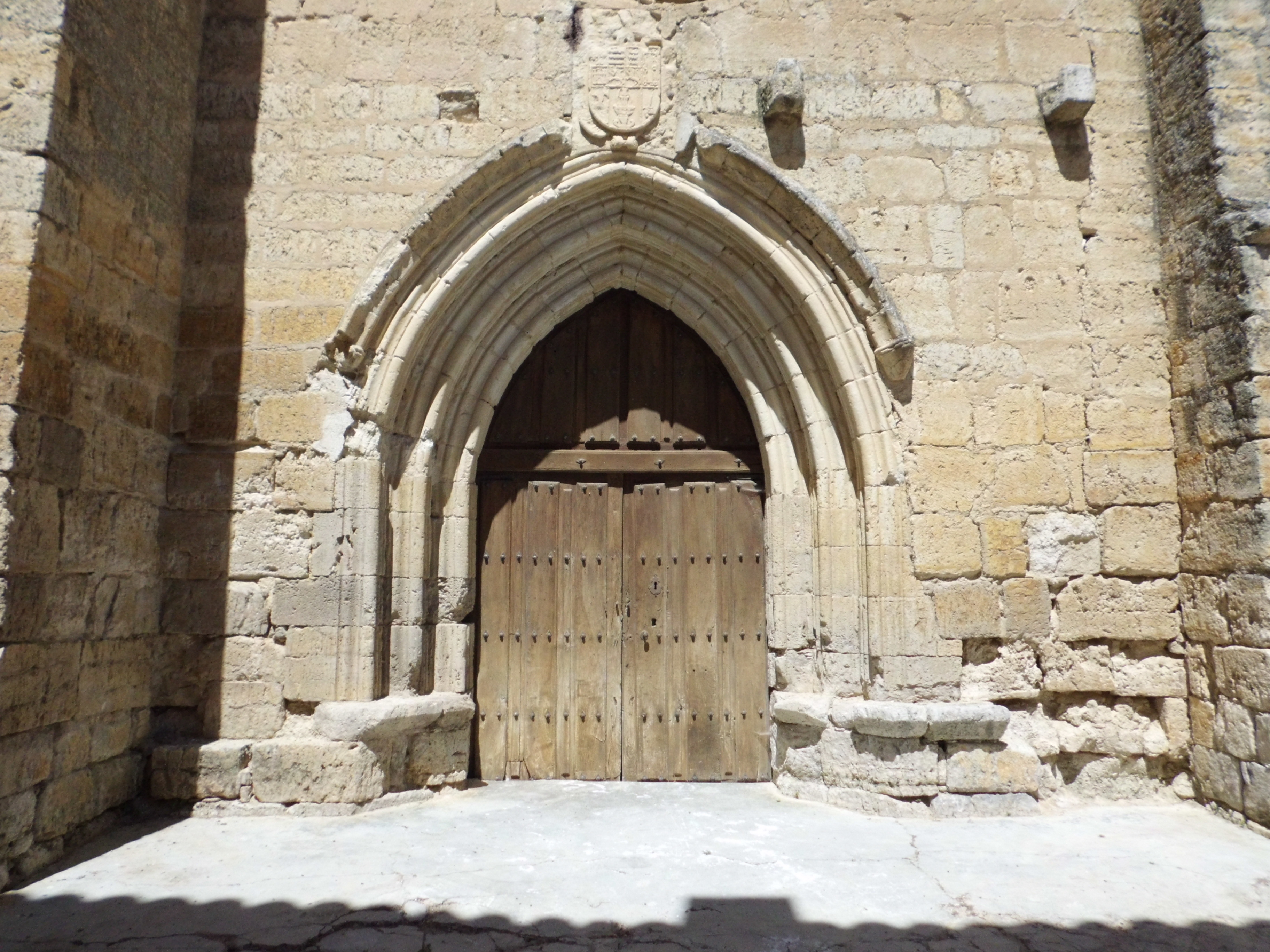 Támara de Campos (Palencia, España). Iglesia del monasterio benedictino de San Miguel, gótica del siglo XV.